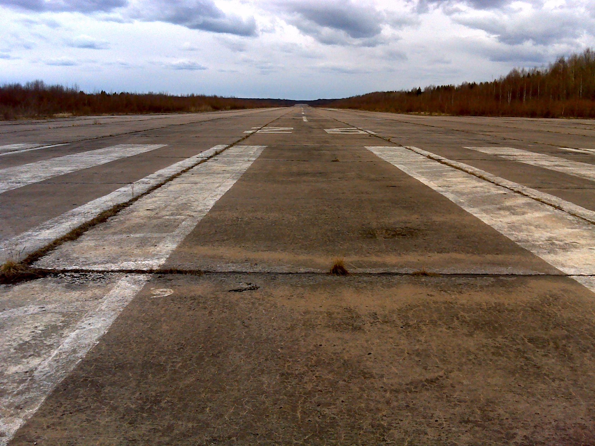 Фото вида с торца ВПП аэродрома "Лахта" пос. Катунино, Архангельской области. В настоящее время аэродром заброшен.